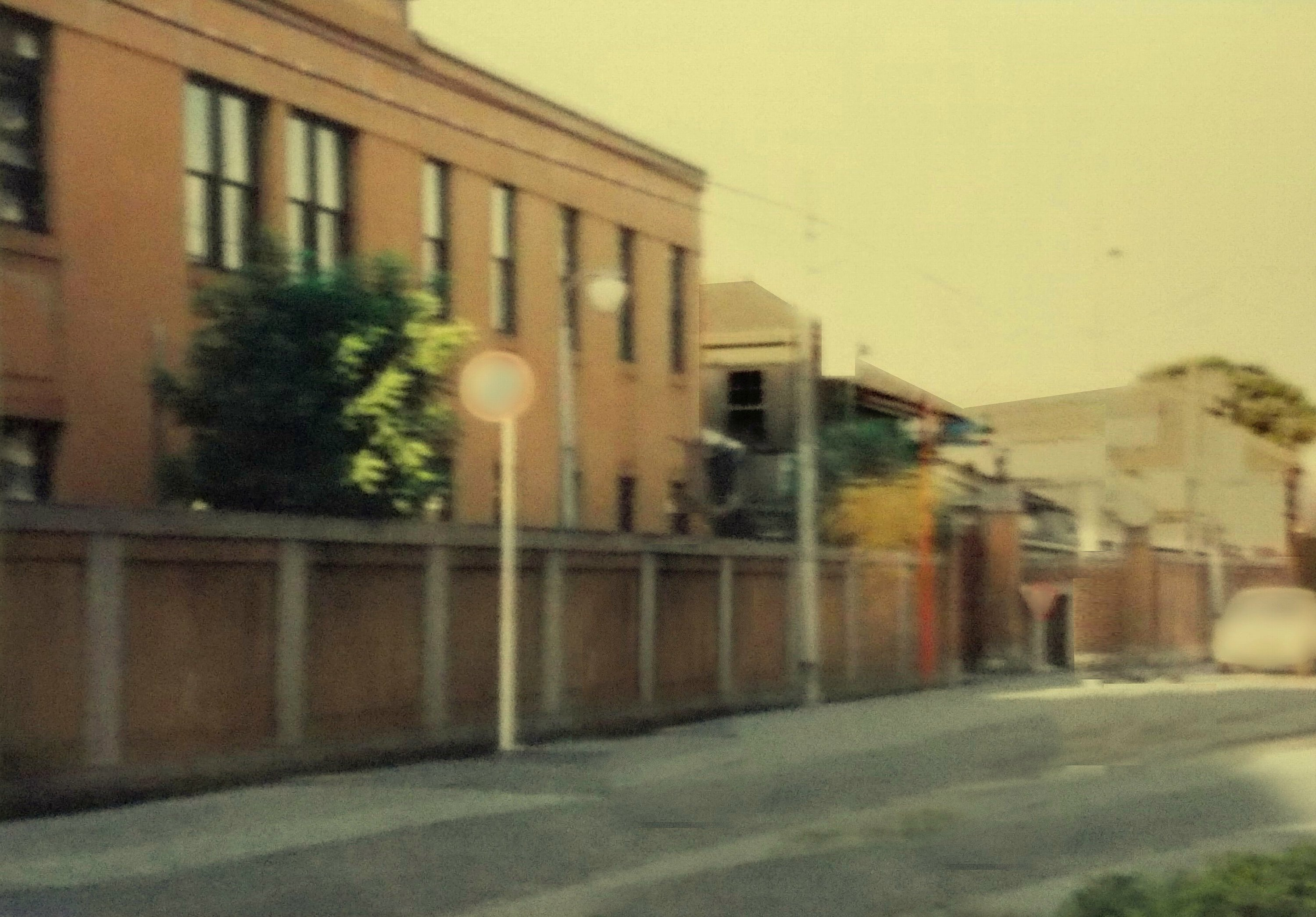 旧野田醤油本店